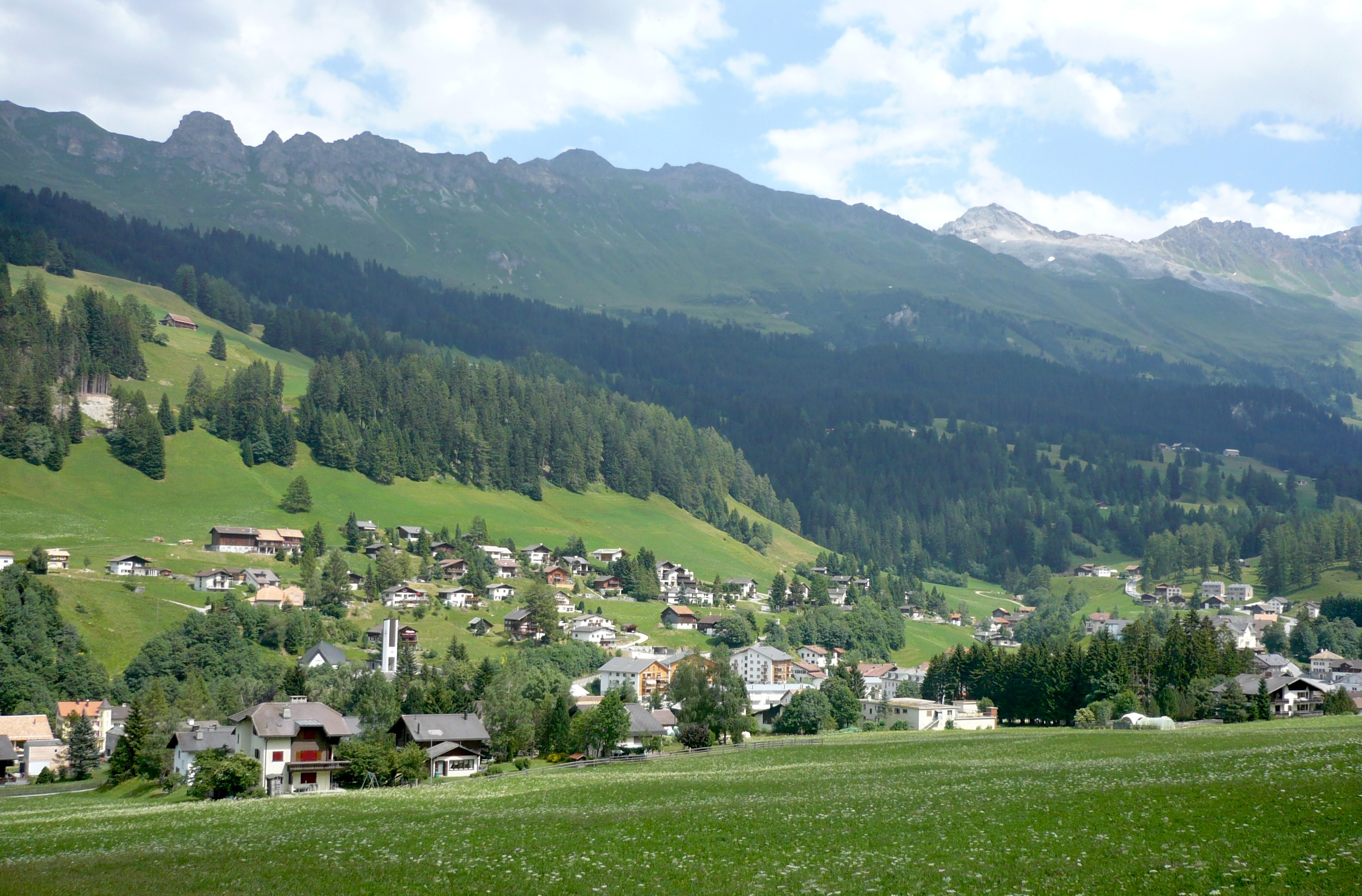 Churwalden Dorf